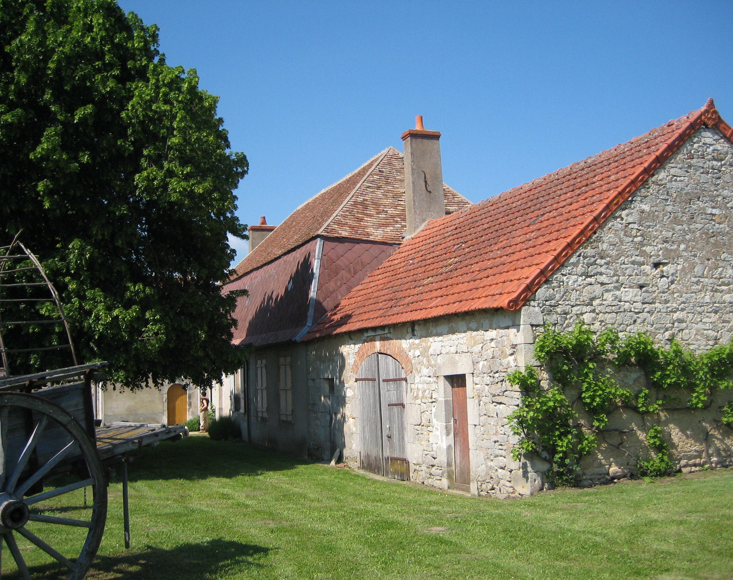 Le Centre de la Presse est installé dans l'ancien presbytère jouxtant l'église du XIIe siècle